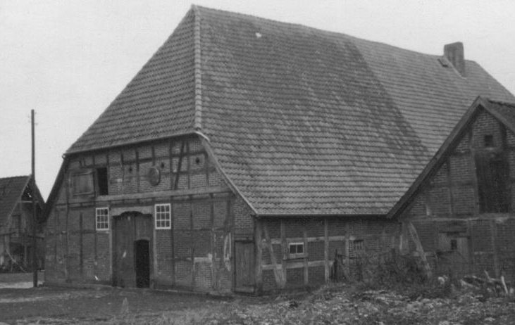 Der Stammhof der Oelfkes in Oerbke